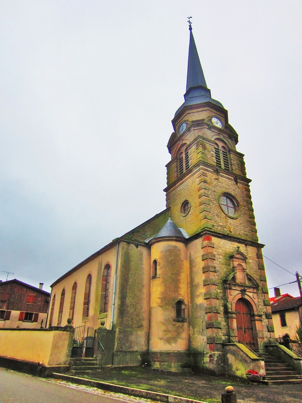 Eglise Domnon Dieuze